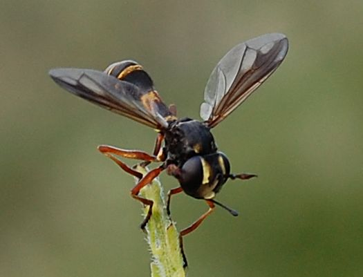 Conopidae to determine